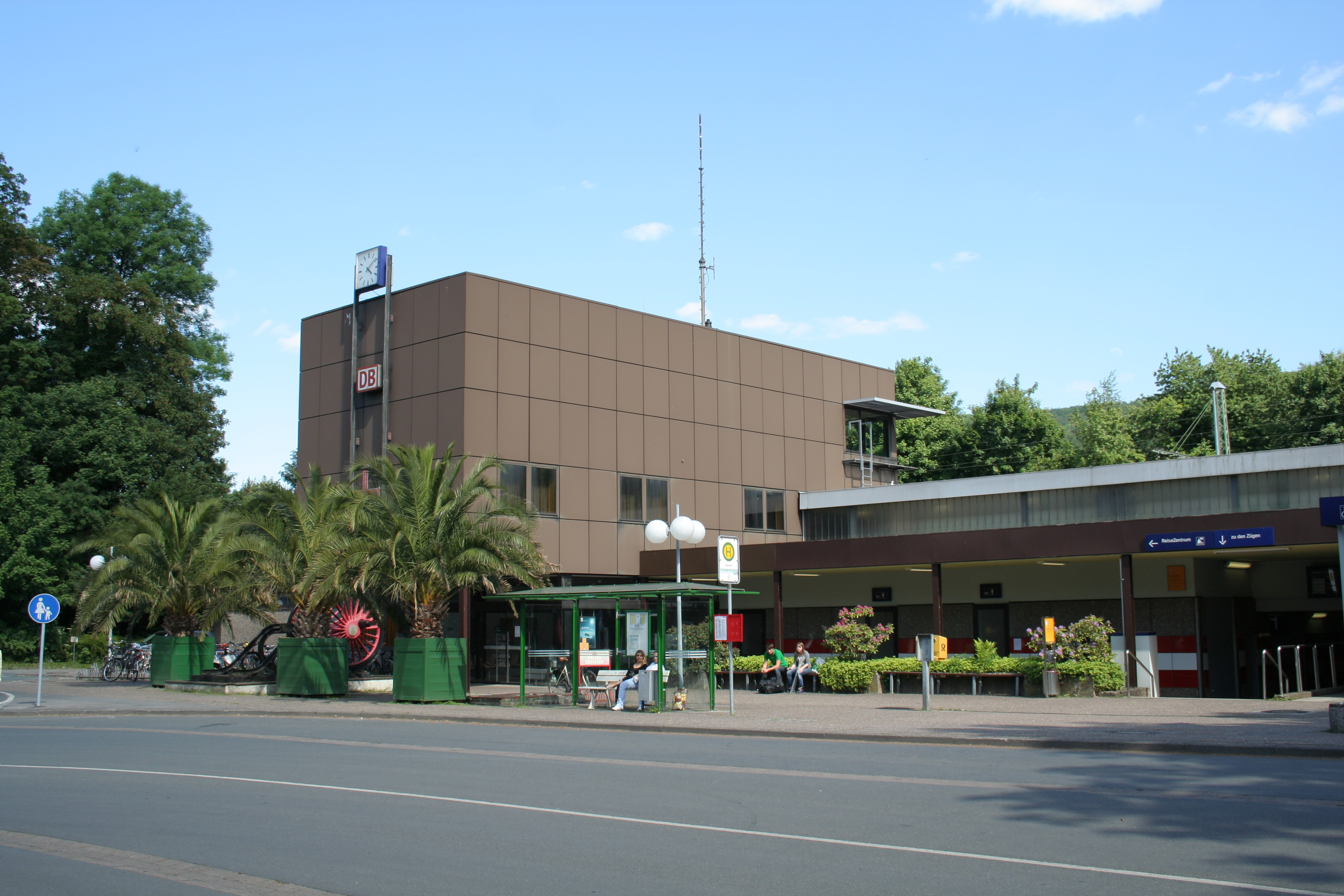 Bahnhofsgebäude und -vorplatz in Bad Pyrmont